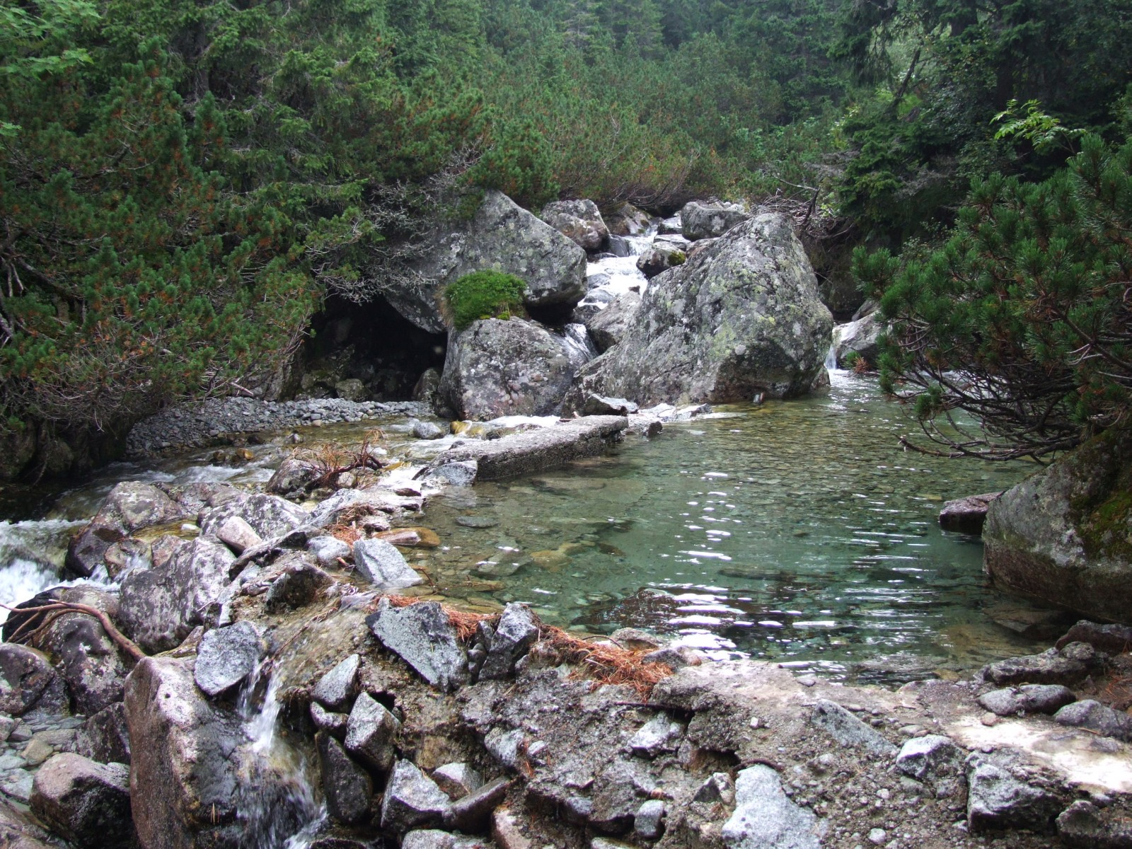 Mała Zimna Woda (Tatry Wysokie)